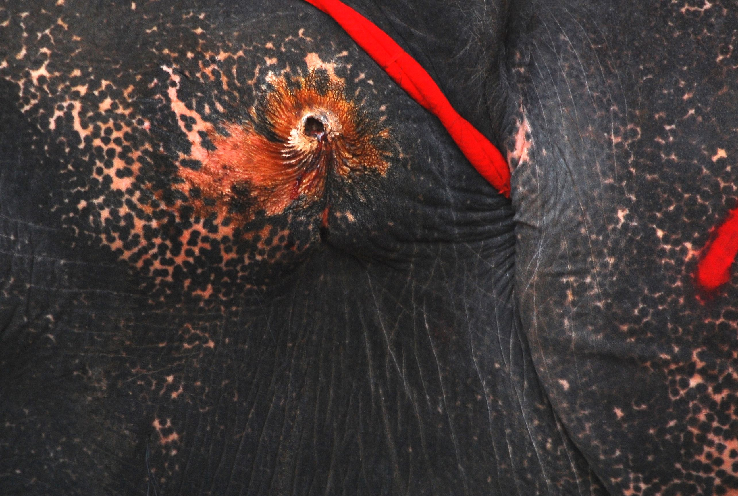 ആനയുടെ മദഗ്രന്ഥി